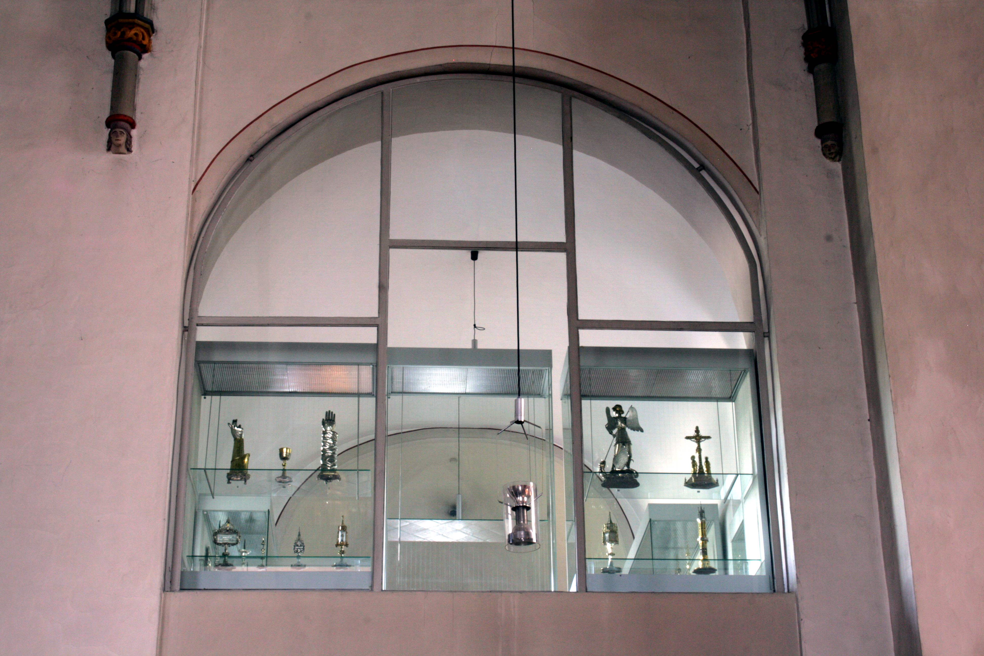 Sankt Martini in Emmerich am Rhein